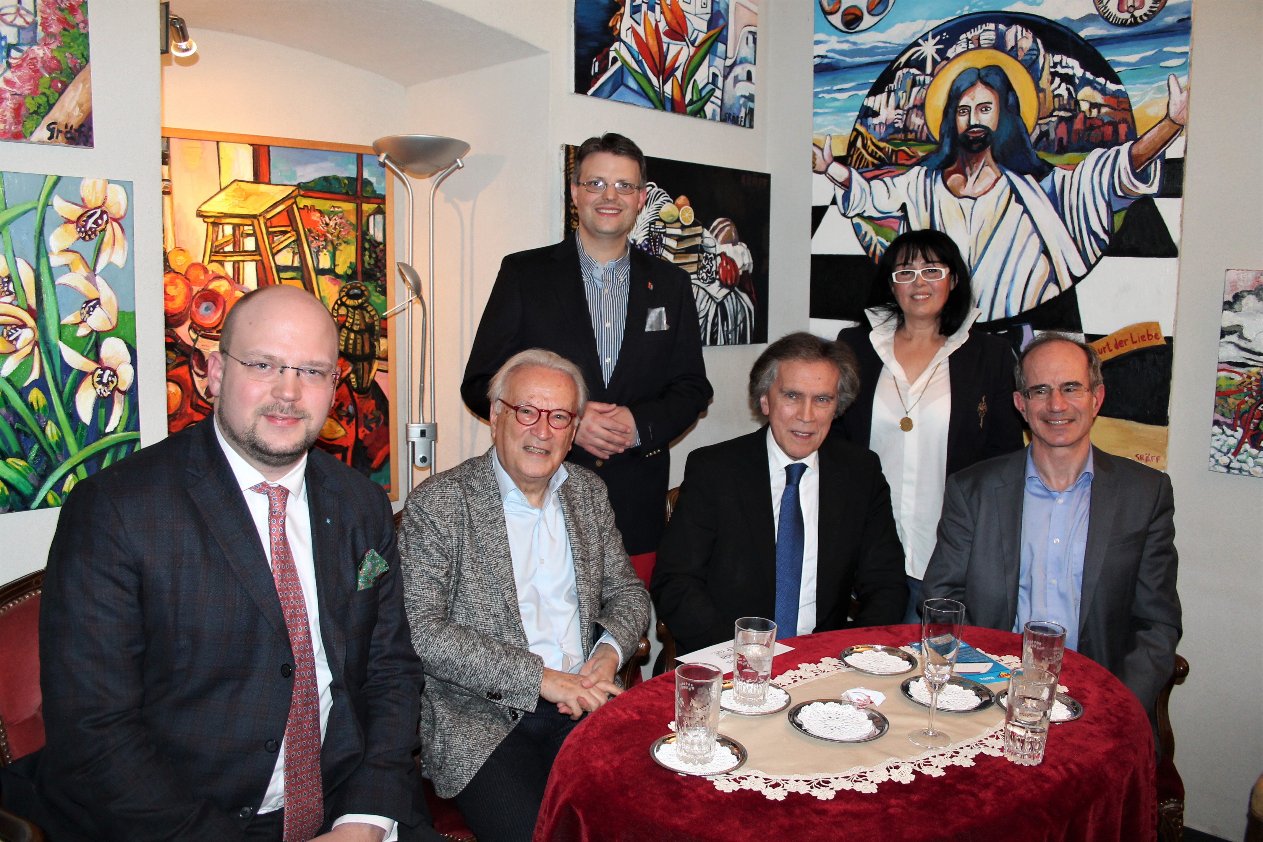 Veranstaltungsreihe "Dialog im Kamptal". "Politik, Diplomatie im 21. Jahrhundert", veranstaltet durch Georgia Kazantzidu und Matthias Laurenz Gräff im Atelier Gräff in Zitternberg, Gars am Kamp, 27. 1. 2020 vortragende Diskutanten: S.E. Botschafter Dr. Emil Brix, MEP ret. Dr. Hannes Swoboda (ehemals Präsident der europäischen Sozialdemokraten im EU-Parlament), Philipp Jauernik, BA (Paneuropabewegung Österreich) Moderation durch Dr. Eric Frey (Der Standard) Personen am Foto: Philipp Jauernik, Hannes Swoboda, Matthias Laurenz Gräff, Emil Brix, Georgia Kazantzidu, Eric Frey